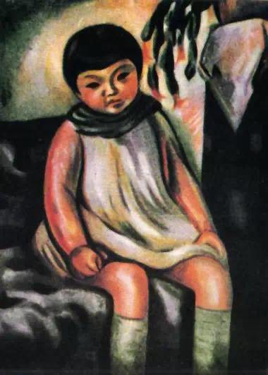 中文（中国大陆）: 蔡威廉畫作《女孩》